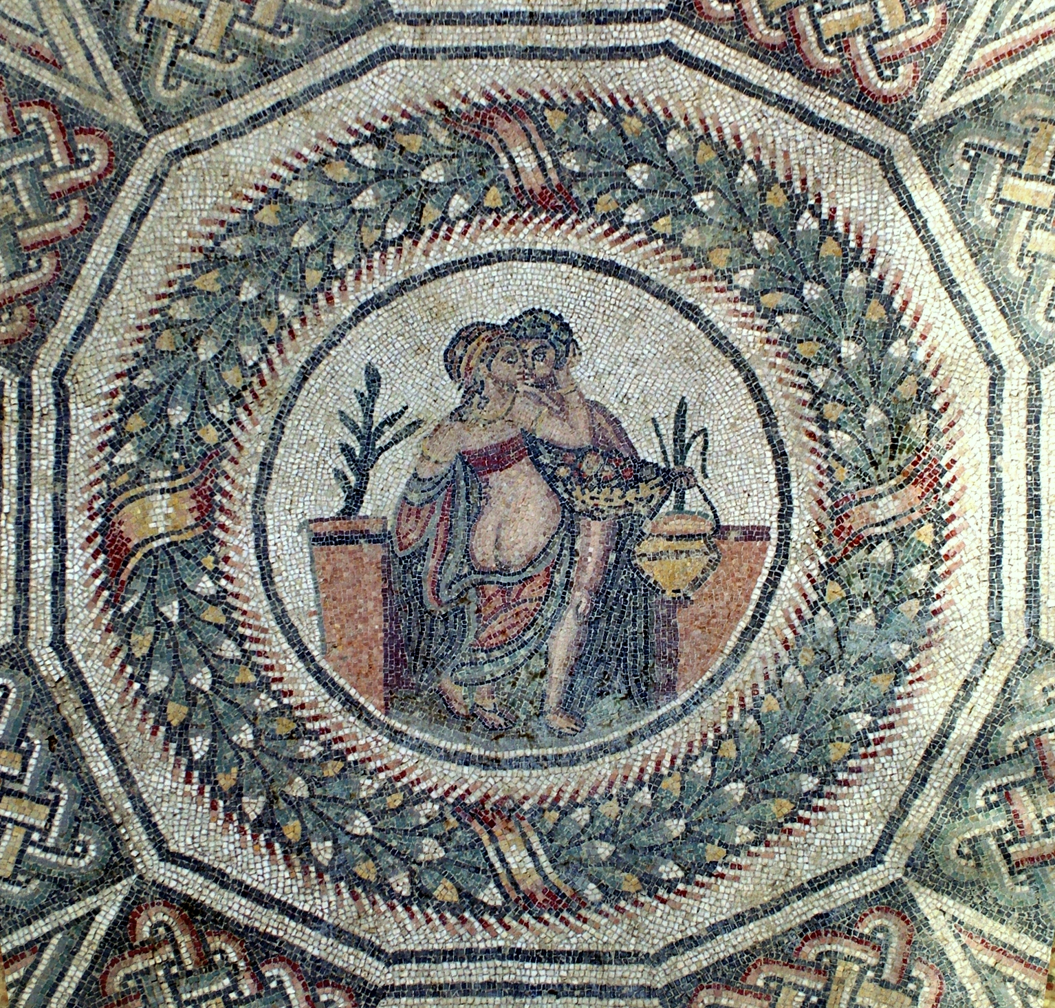 Piazza Armerina, Sizilien, Villa Romana del Casale, ein Mosaik in dem Schlafzimmer (Privaträume) der Hausherrin, es zeigt ein Liebespaar.